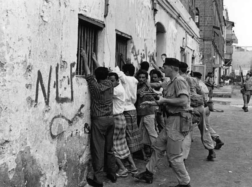 حملة تفتيش للماره بحثا عن اسلحه او ثوار 1967 عدن